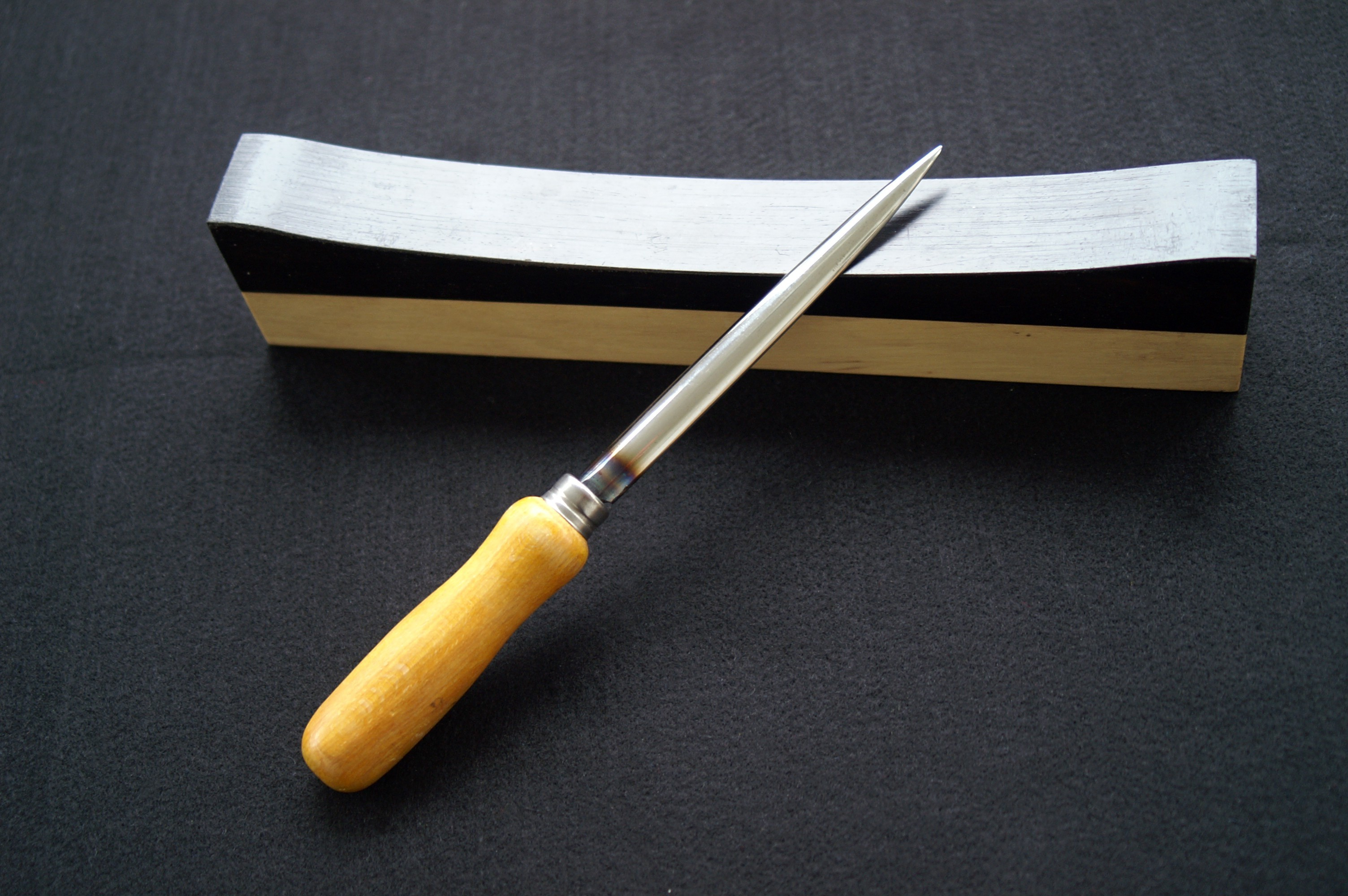 Aufwurfblock und dazu passender Polierstahl zum aufwerfen von Zungen des Zungenregisters einer Orgel